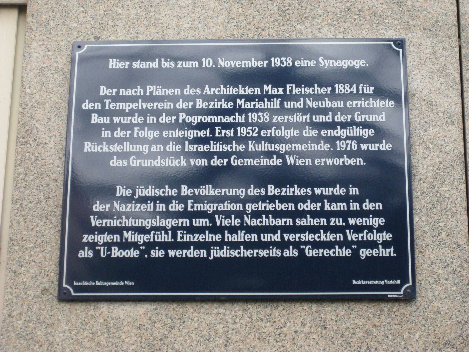 2010 enthüllte Erinnerungstafel am Loquaiplatz 5-6 für den 1938 zerstörten Schmalzhoftempel. Das später auf dem Grundstück errichtete Pensionistenwohnheim hat die Anschrift Loquaiplatz 5-6 (Vorderseite) und reicht bis zur Schmalzhofgasse 3 (Rückseite, wo sich 1984 bis 2010 eine heute nicht mehr vorhandene Gedenktafel befand)